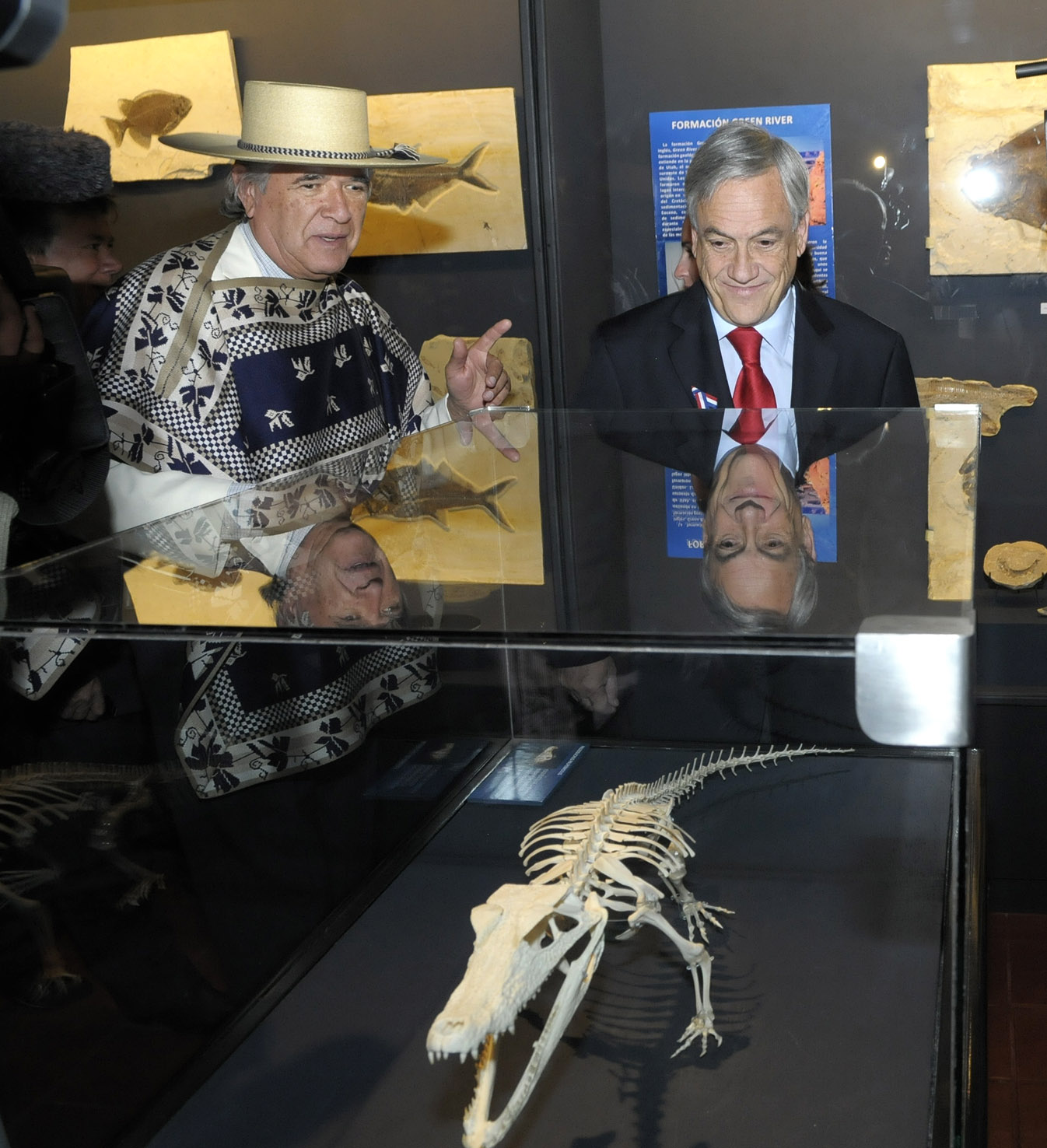 Carlos Cardoen y Sebastián Piñera en la reinaguración del Museo de Colchagua, en Santa Cruz.